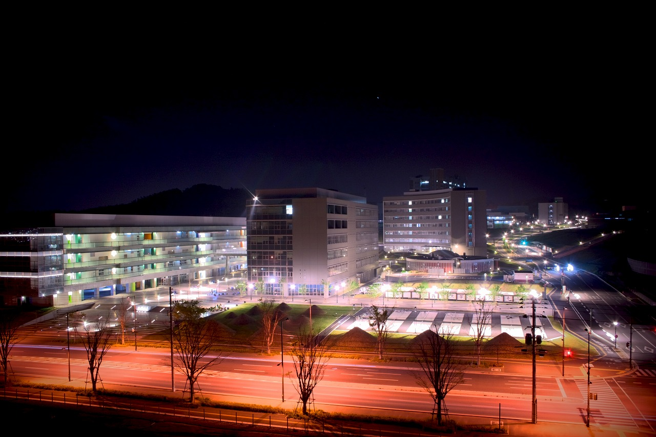 九州大学伊都キャンパス 2009年04月12日撮影